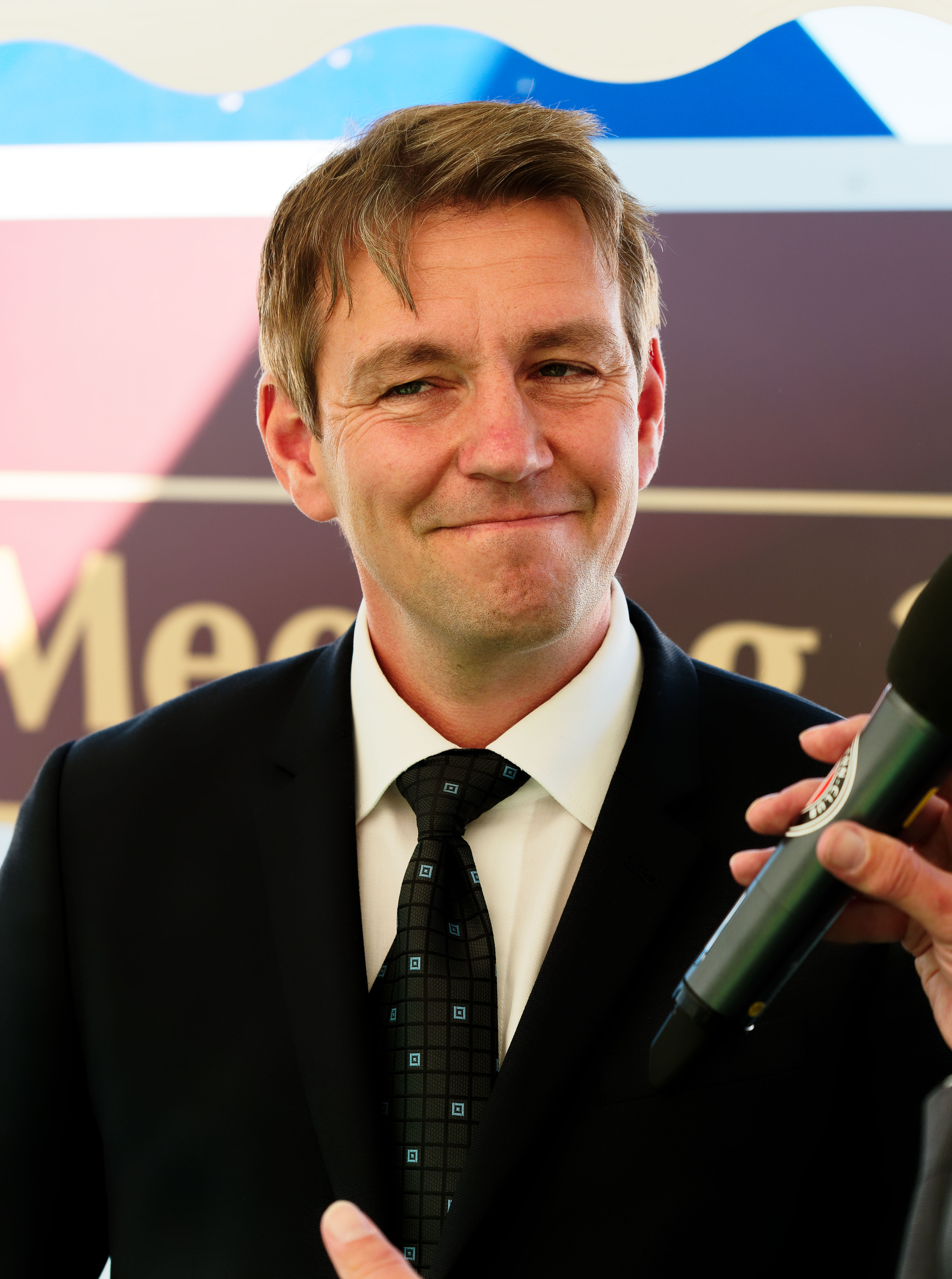 Markus Klug im Interview nach dem Sieg seines Pferdes Dschingis Secret im Hansa Preis 2018.